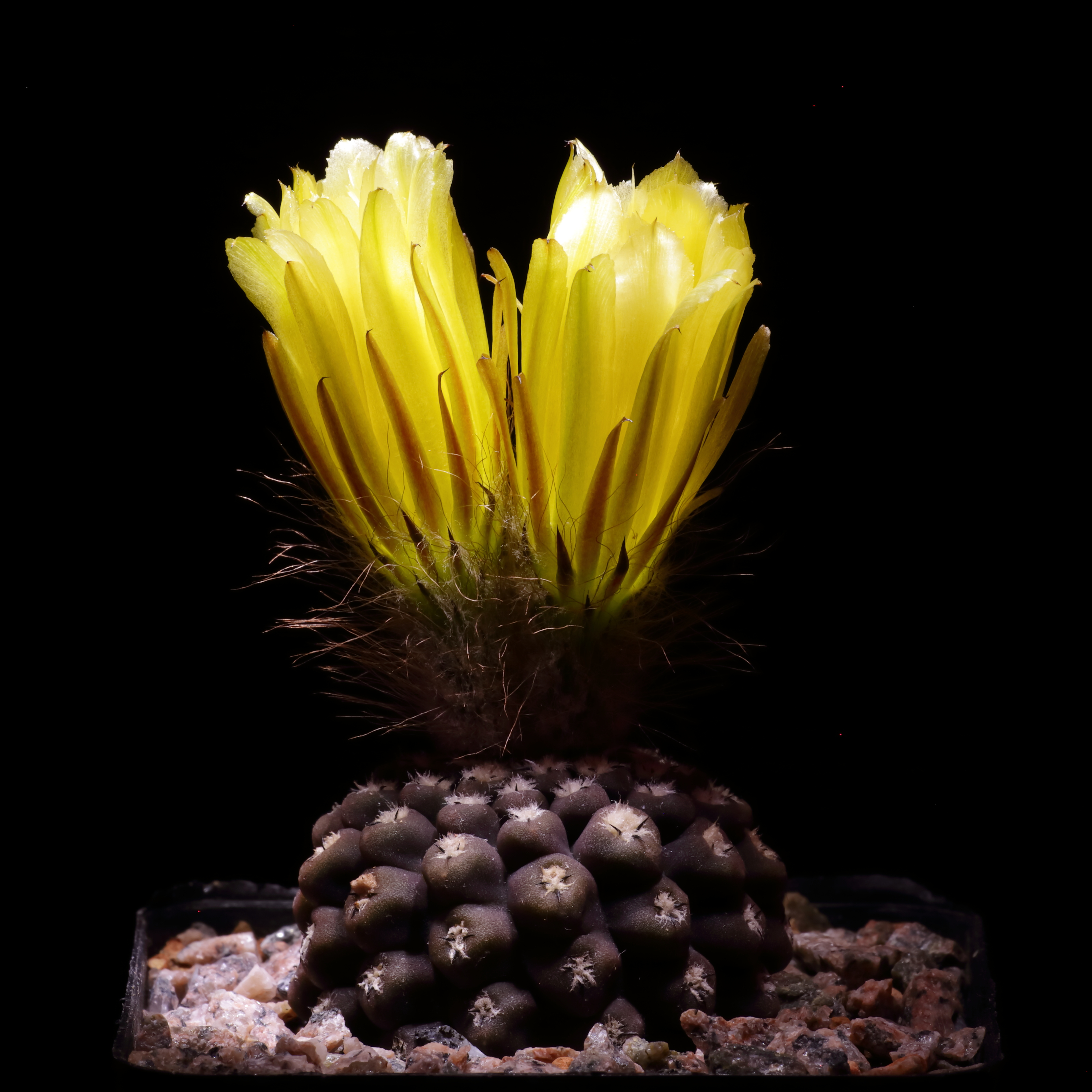 Eriosyce napina ssp. riparia JA 40 i min privata samling.